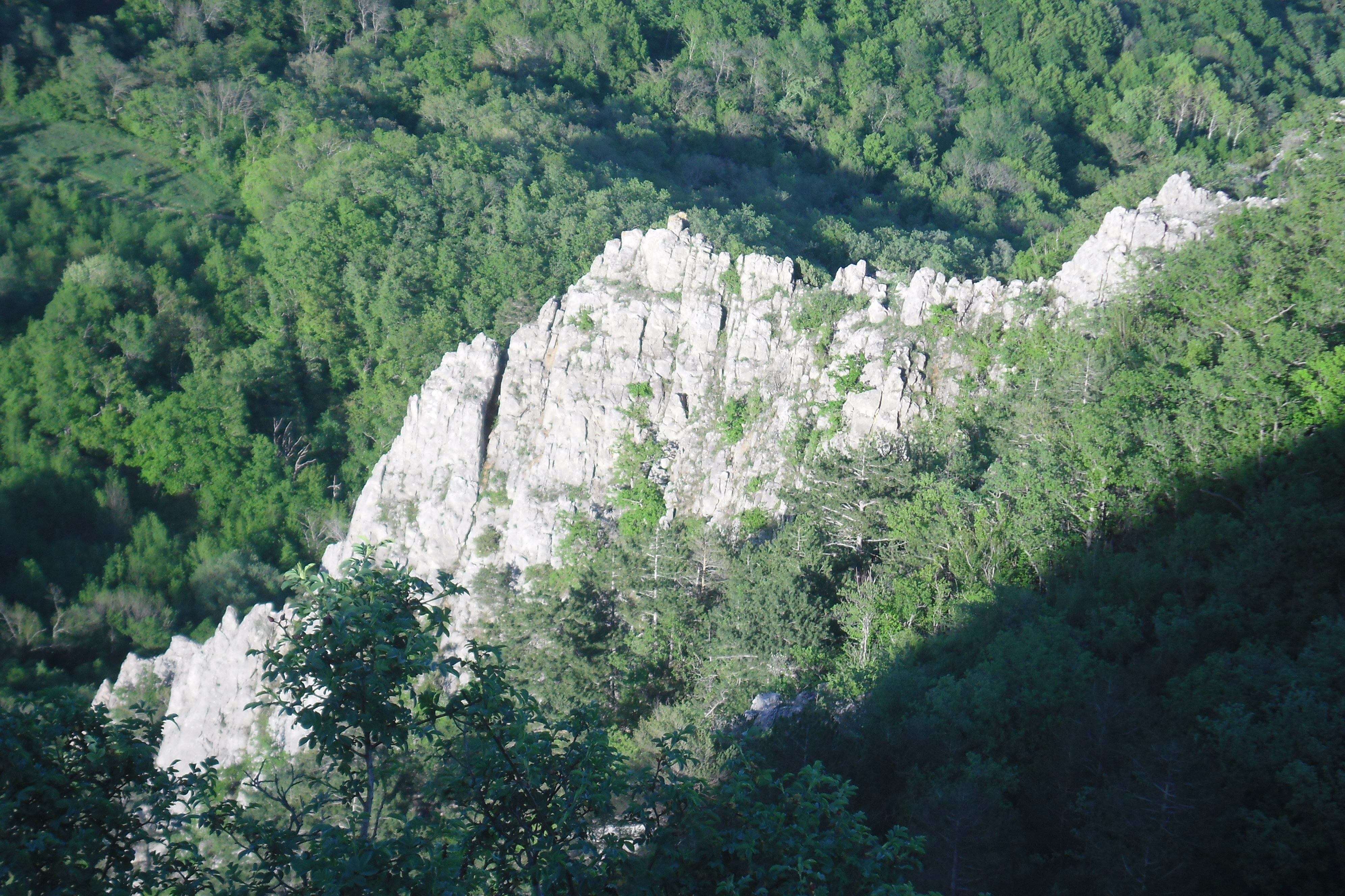 Фото